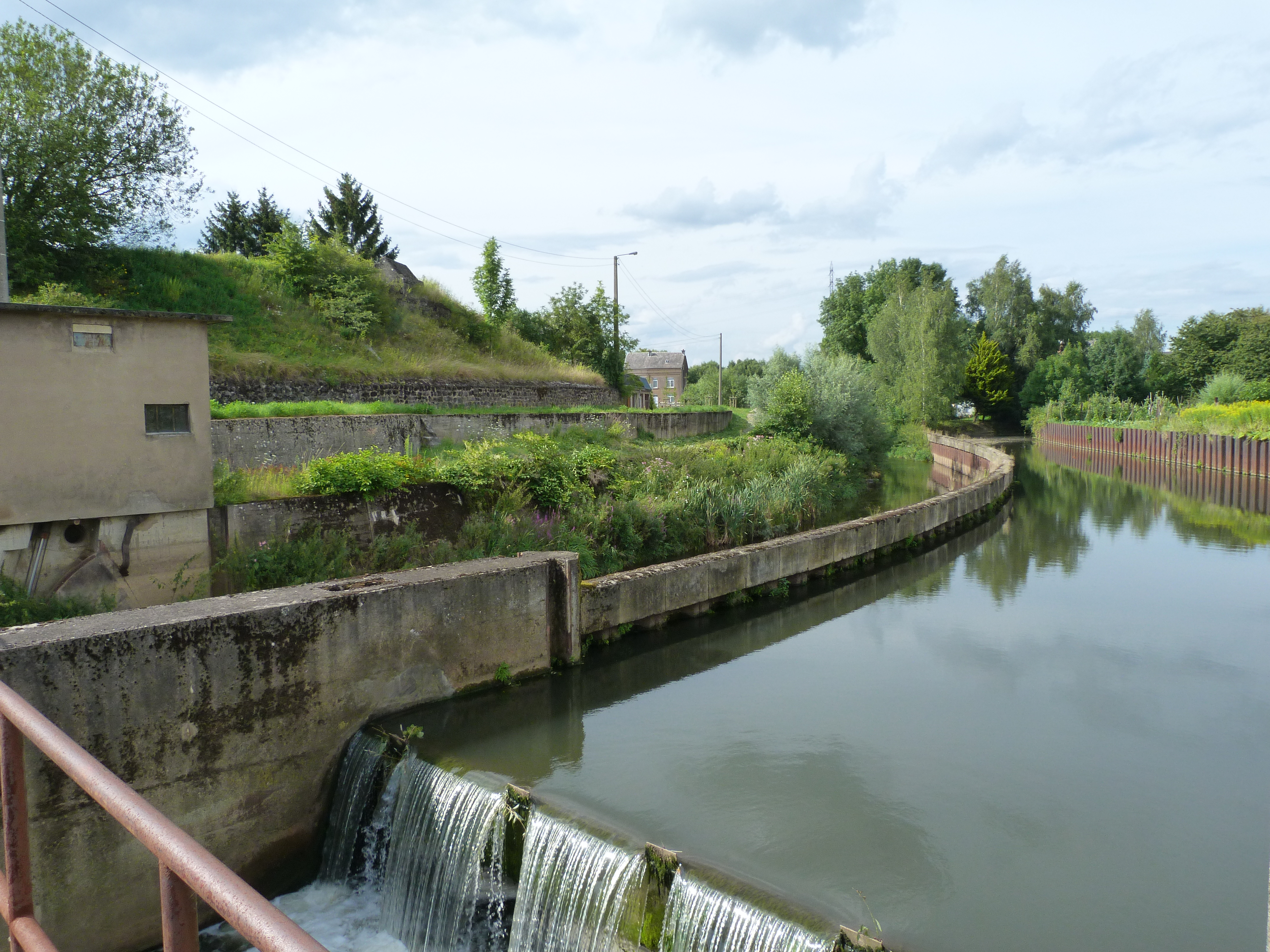 Ecluse usine Athus